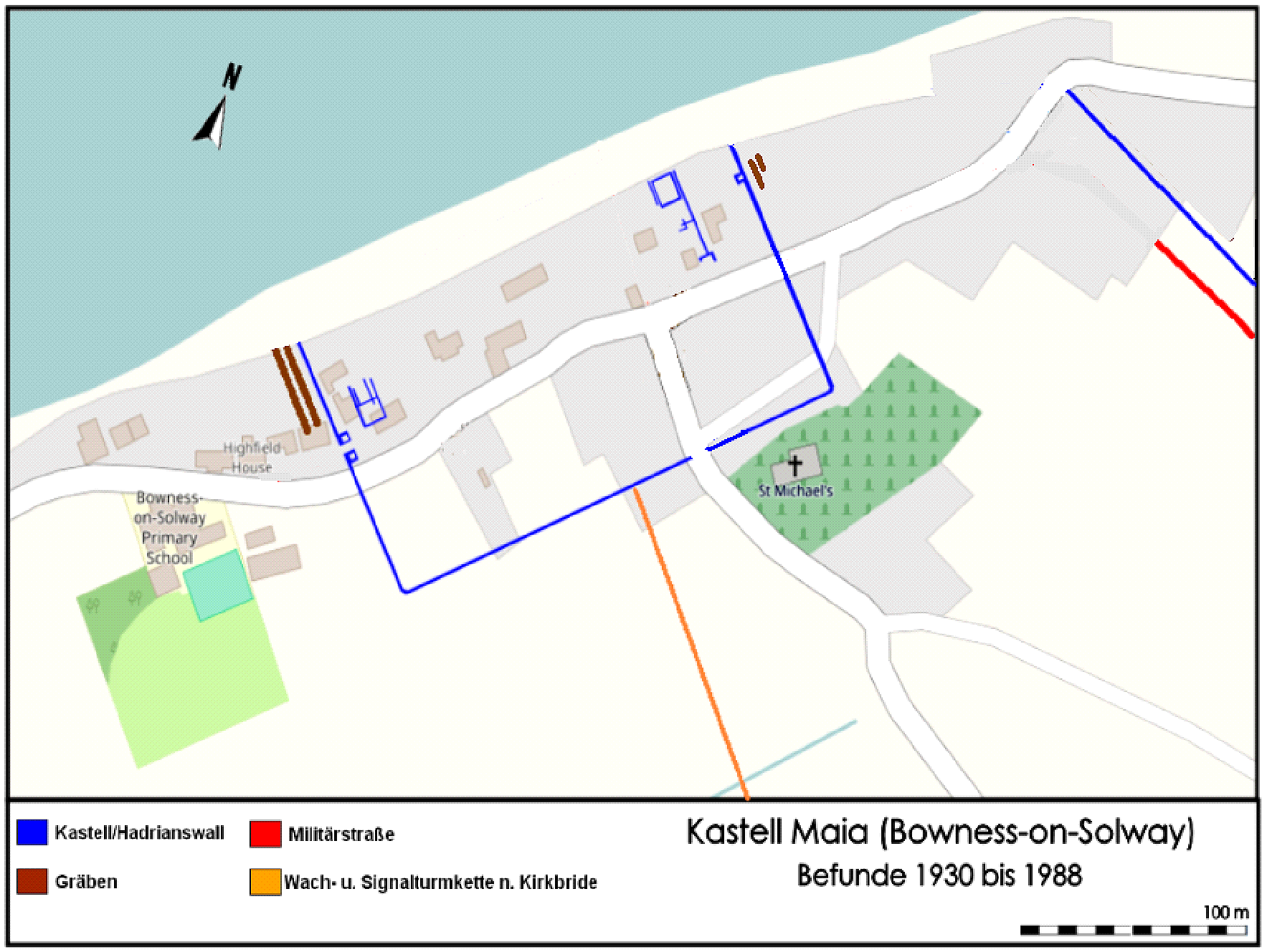 Befundplan des römischen Hilfstruppenkastell Maia/Bowness-on-Solway (Hadrianswall), 1930 - 1988.